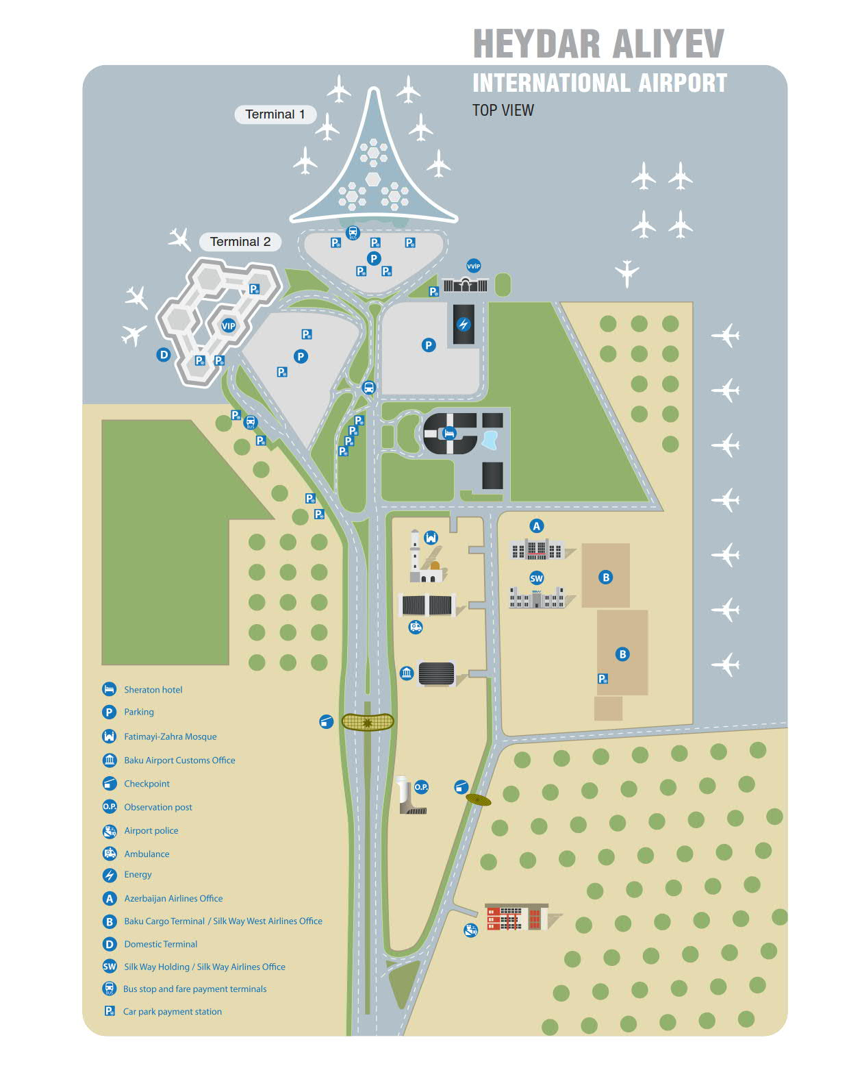 Heydər Əliyev Beynəlxalq Hava Limanının ümumi planı